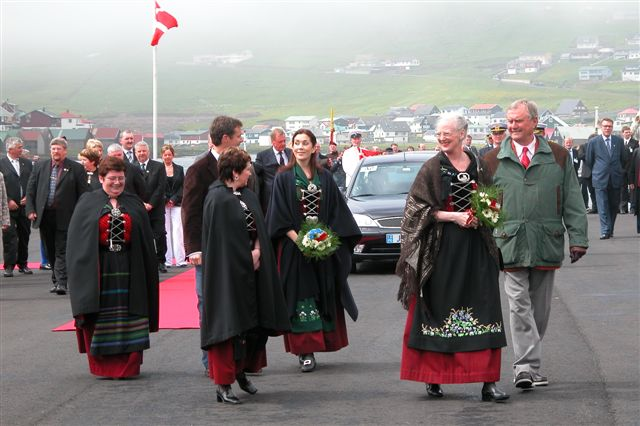 Royal visit in Vágur, Faroe Island 21-06 2005